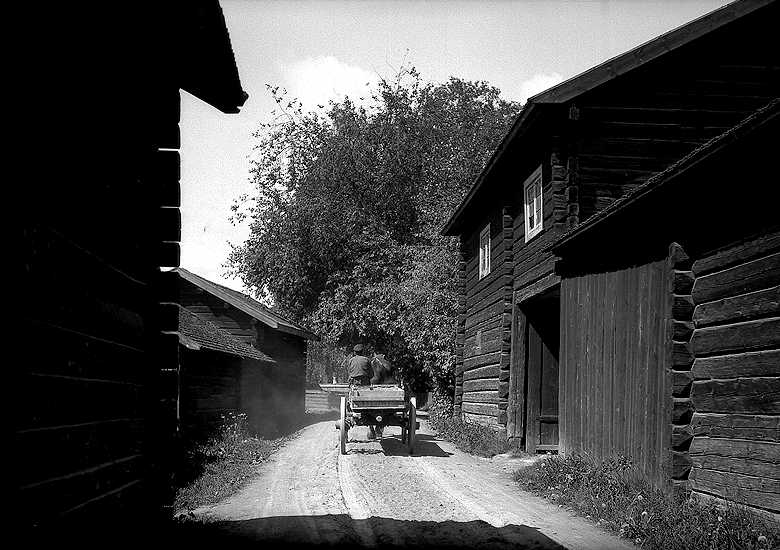 Fotografi av Karl Lärka, häst och vagn på bygata.